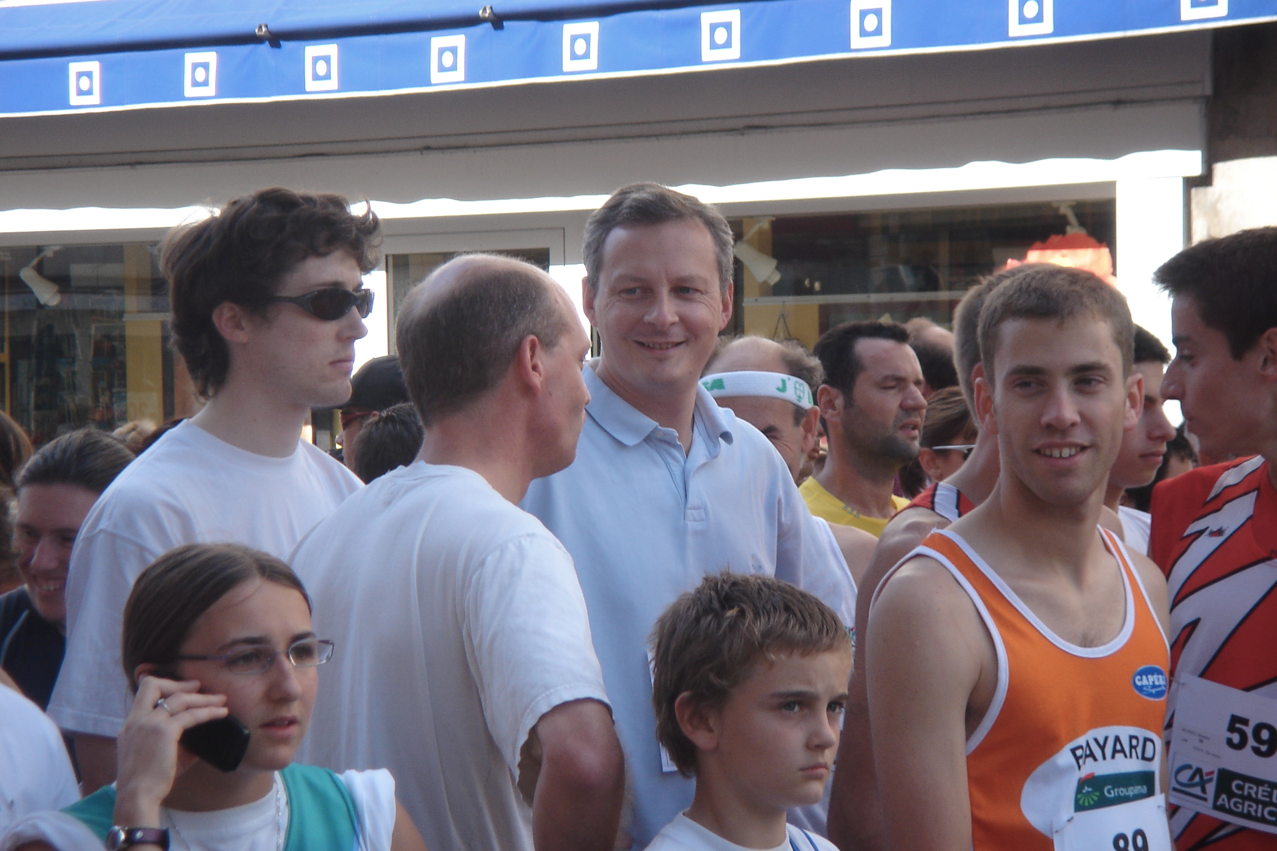 Bruno Le Maire